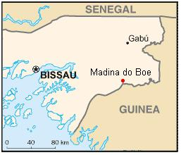 Die Lage der guinea-bissauischen Stadt Boe.